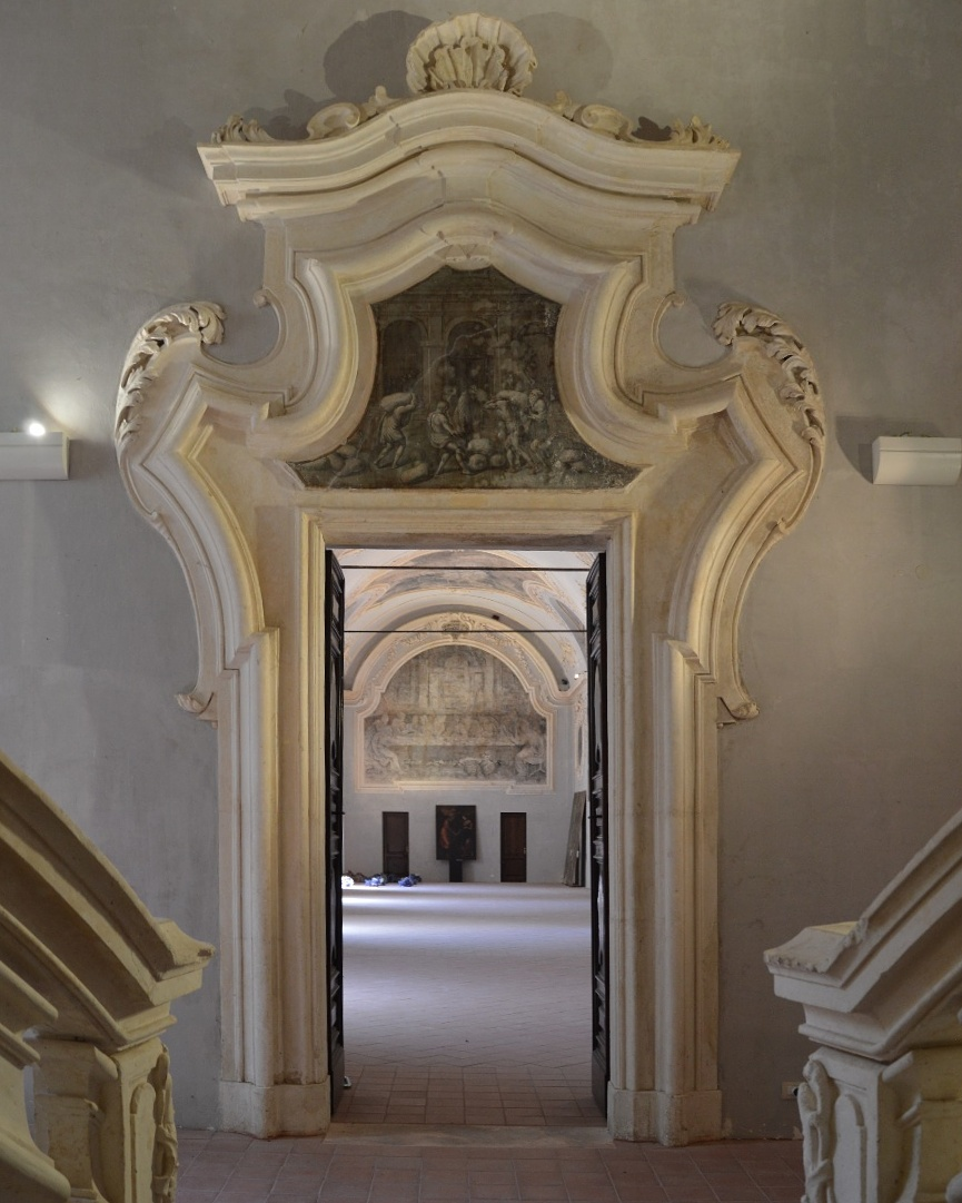 abbazia Sulmon